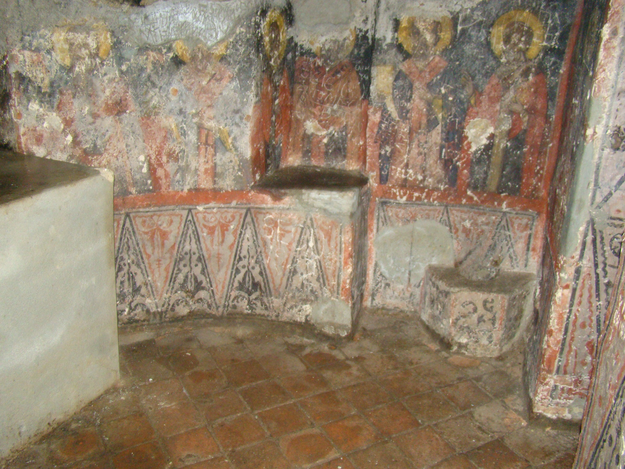 Biserica „Intrarea în Biserică” - sat Bistrița; comuna Costești, - În peștera Sf. Grigore Decapolitul, sec. XV, înc. sec. XVI